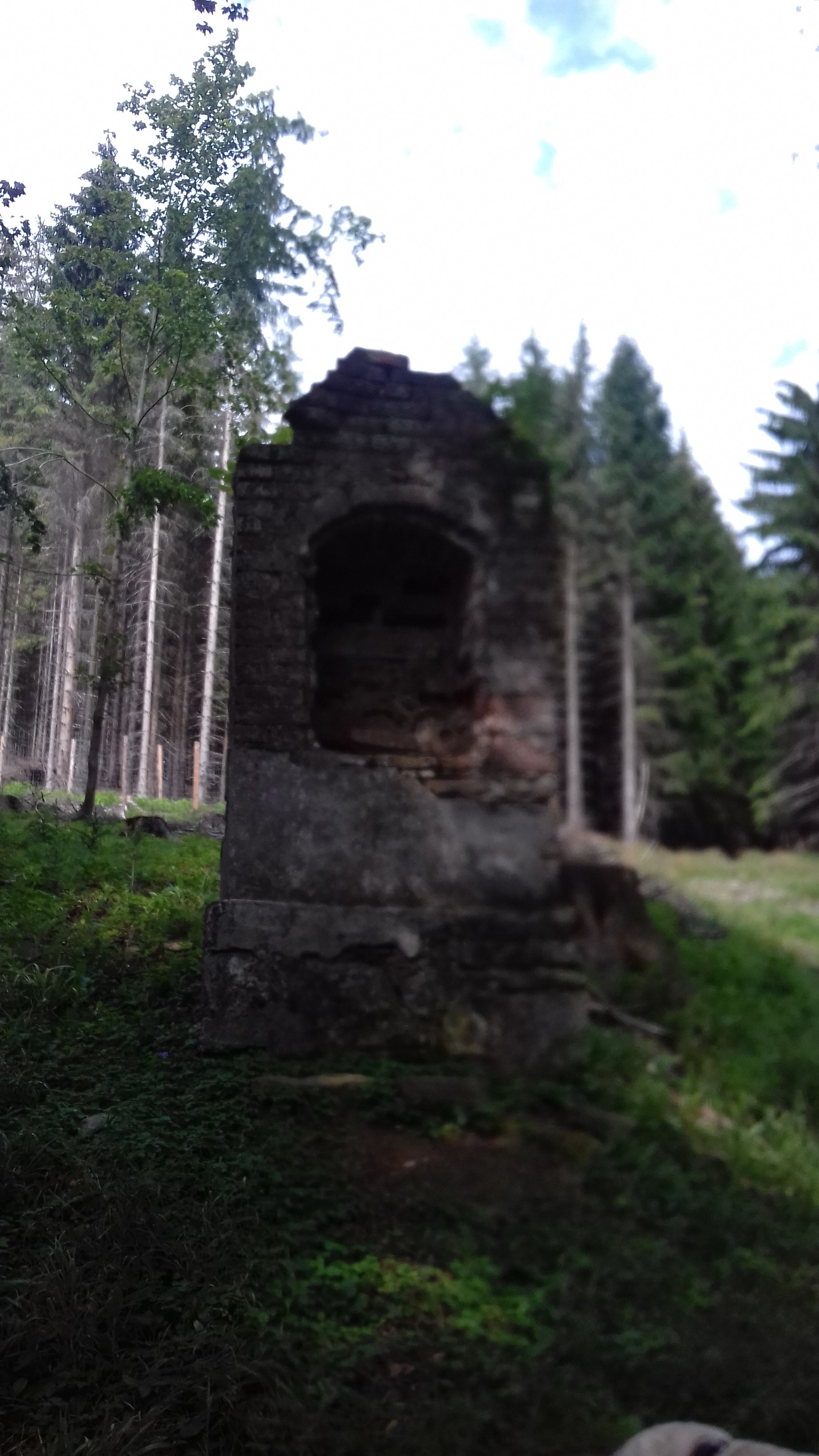 jedna z kapliček